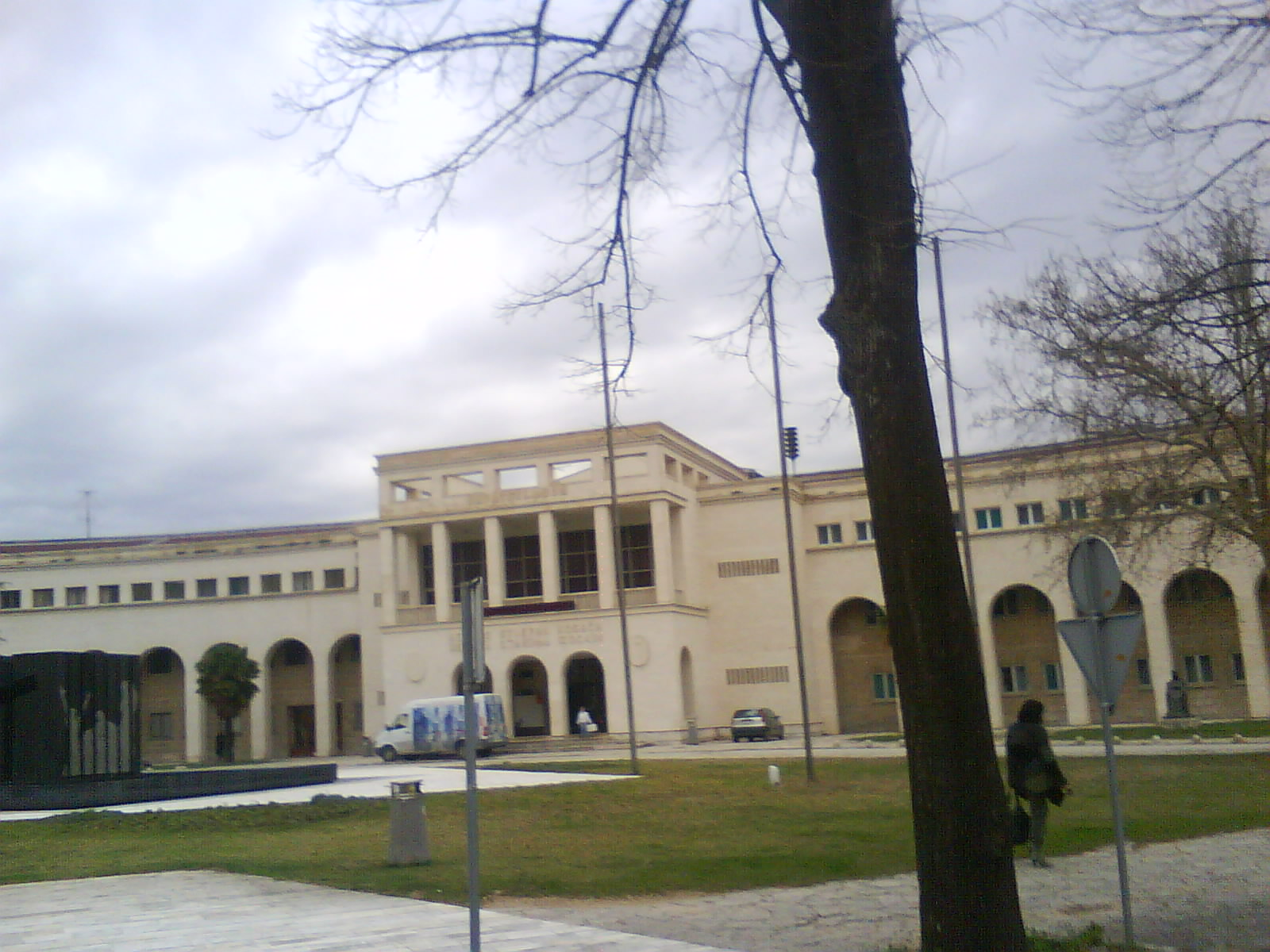 Dom Herceg Stjepana Kosače